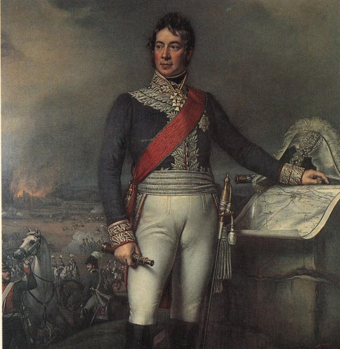 Feldmarschall Carl Philipp Fürst von Wrede